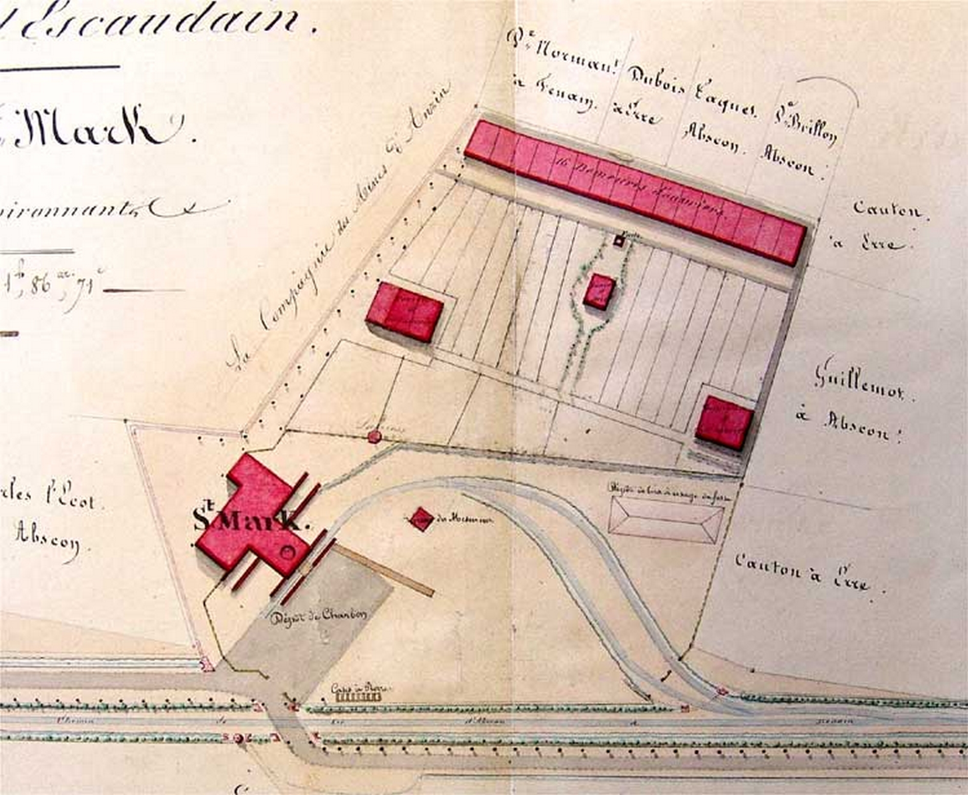 La fosse Saint-Mark de la Compagnie des mines d'Anzin était un charbonnage constitué de deux puits situé à Escaudain, Nord, Nord-Pas-de-Calais, France.